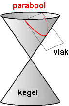 wiki fr, Christophe Dang Ngoc Chan, GNU FDL